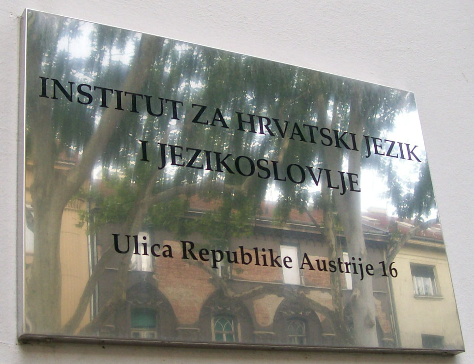 Ploča Institut za hrvatski jezik i jezikoslovlje